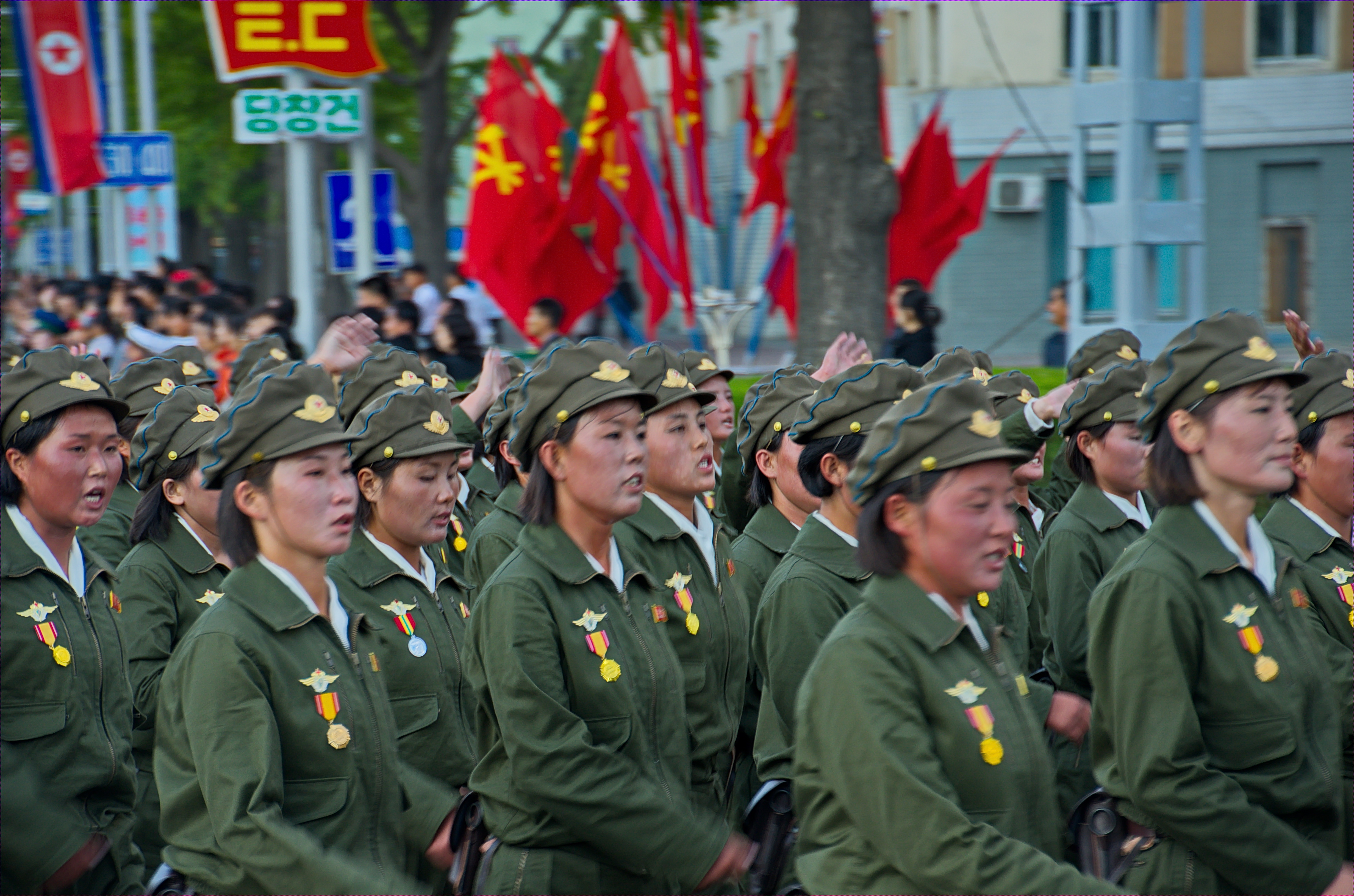 Nordkorea 2015 - Pjöngjang - Parade zum 75. JT der Arbeiterpartei